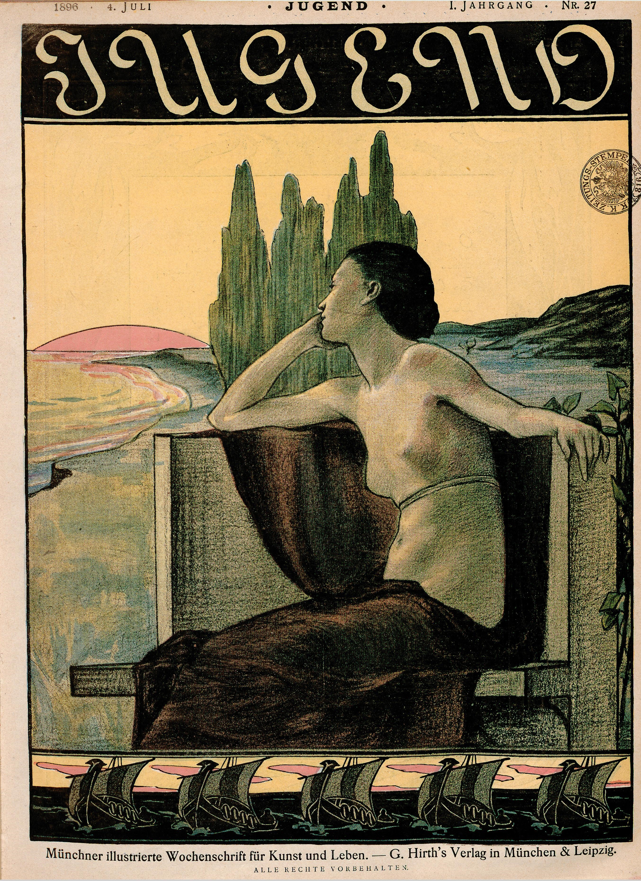 Max Wulff - Umschlag der Kunst- und Literaturzeitschrift "Jugend", Ausgabe Nr. 27/1896.